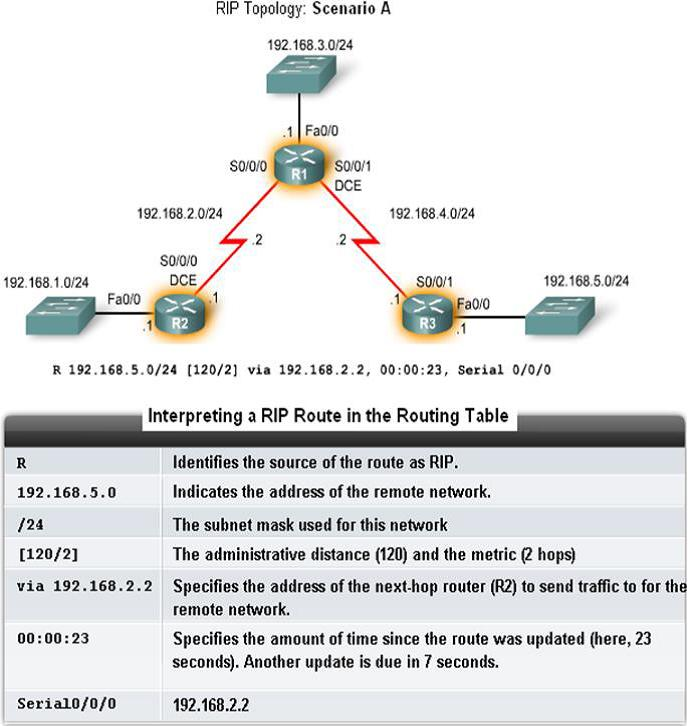 Монгол: routing table